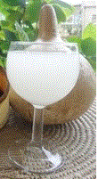 Le Matango ou Vin de Palmes ou Vin blanc Camerounais est une boisson naturellement tirée du Palmier à huile. Légèrement sucré selon les cueillettes, il fait entre 3 et 17° d'alcool. Il est préféré par les Femmes quand il est plus sucré et moins sucré chez les hommes qui y rajoutent souvent des écorces de fermentations et de vigueur pour sa consommation. Difficile à conserver, le vin de palmes reste une boisson très populaire et très prisée de toutes les classes sociales au Cameroun et même au de-là (voir RS4B sarl pour la suite sur This is an image of food from Cameroon